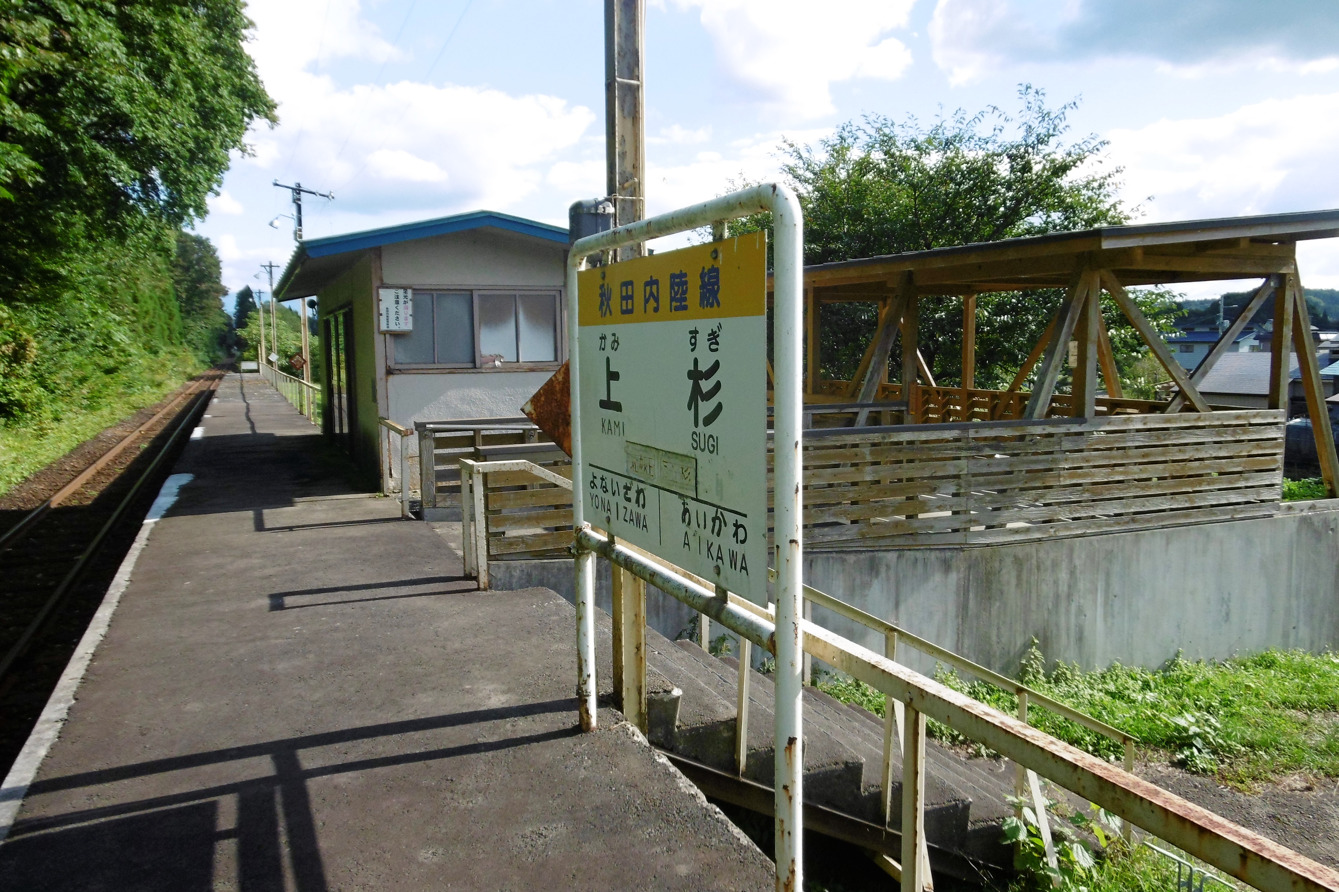 秋田内陸線・上杉駅